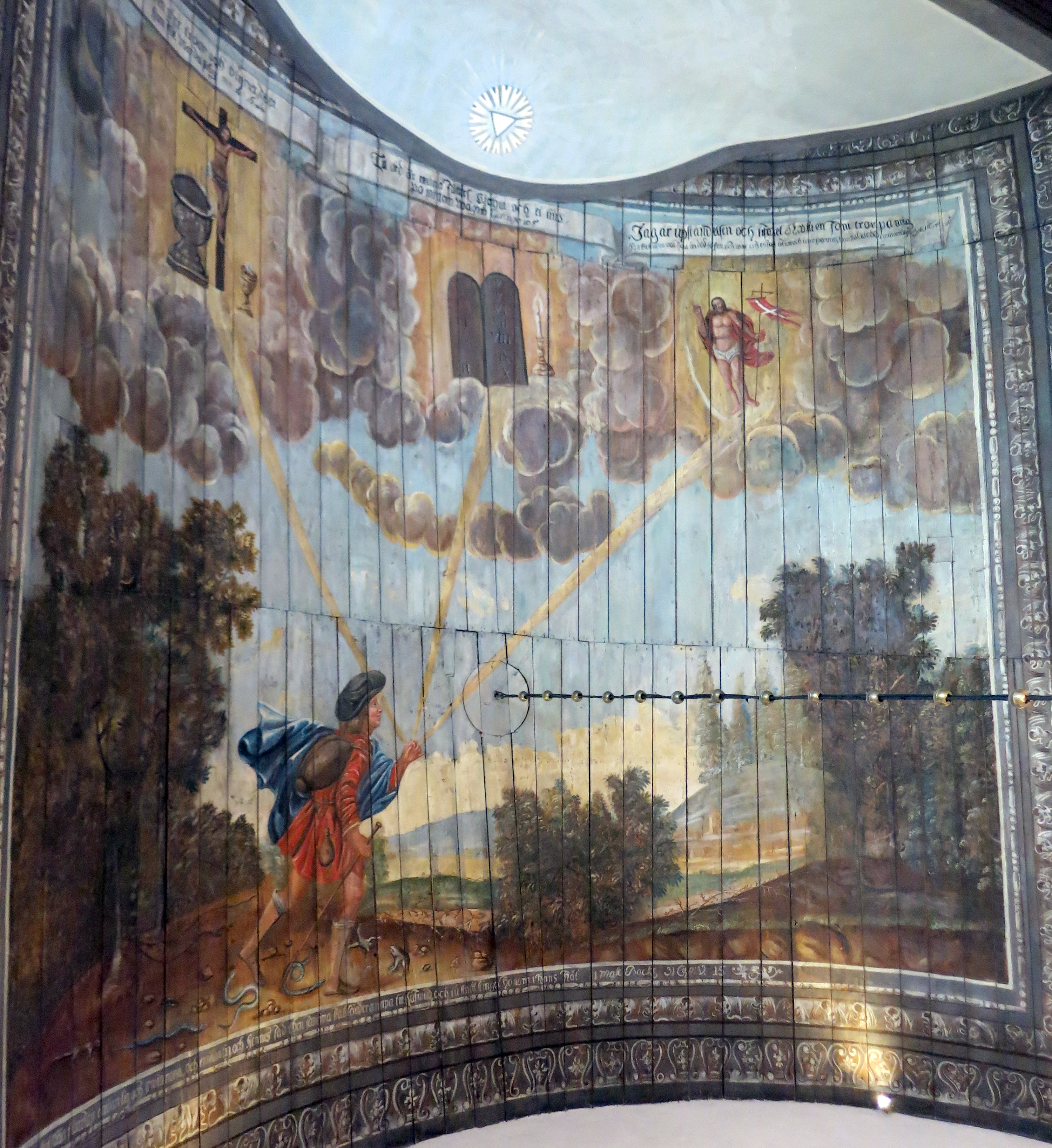 Naverstads kyrka, Bohuslän Takmålning i koret av Christian von Schönfeldt.